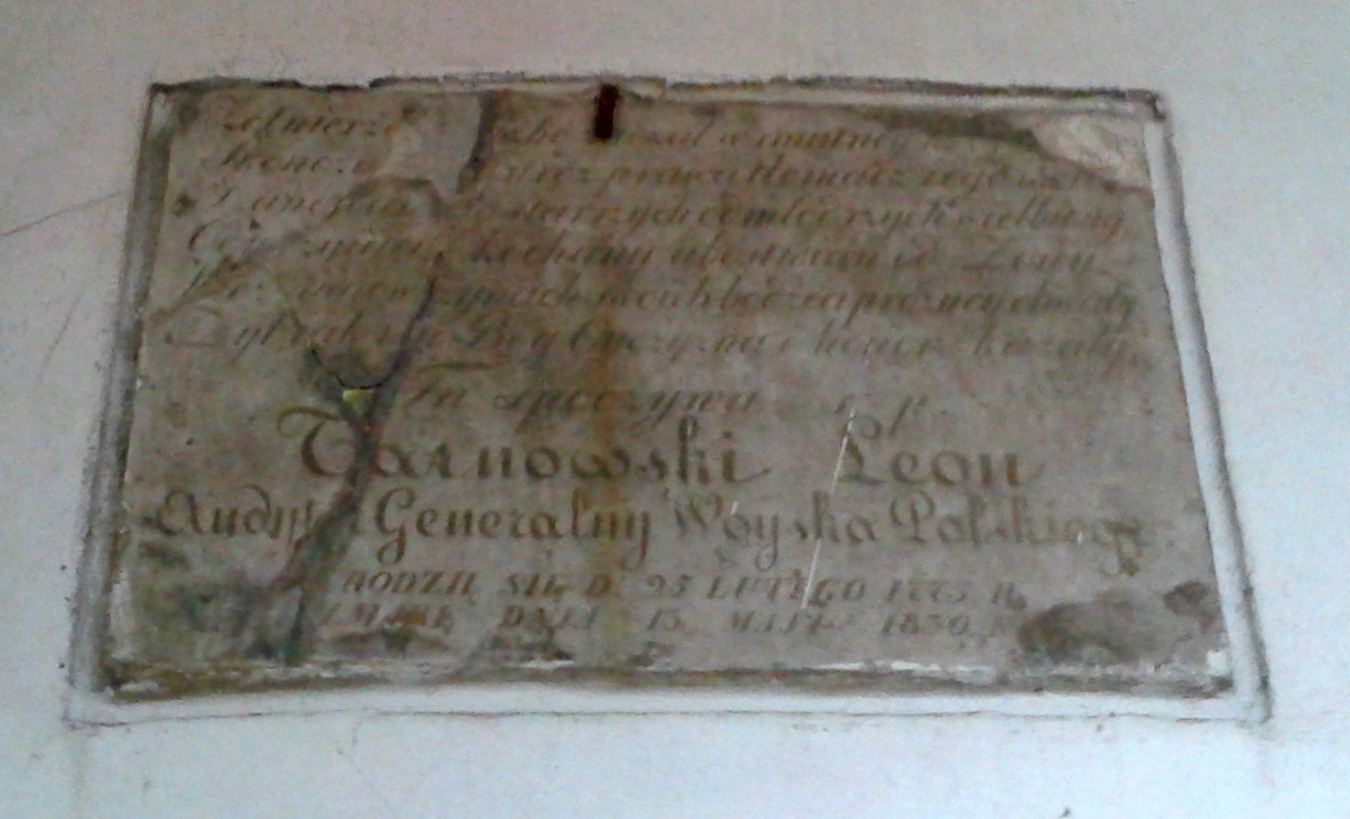 Leon Tarnowski - płyta na ścianie Katakumb na Powązkach w Warszawie. Płyta Leona Tarnowskiego znajduje się w Katakumbach na warszawskich Powązkach, istotnie na przeciwległej ścianie niż tablica z literą „Z” ale naprzeciwko 3 filaru licząc od wschodu, tj. od ulicy Okopowej; i jest to 4 tablica od dołu, natomiast od góry jest to pierwsza tablica prostokątna pod zakończoną łukiem.